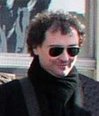 Idis Turato, riječki arhitekt na Riječkom novom valu ispred "Konta"